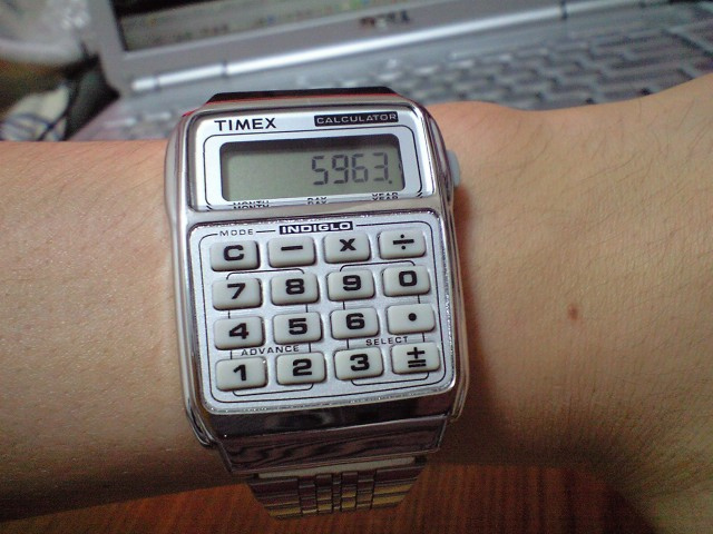 CA3A0441